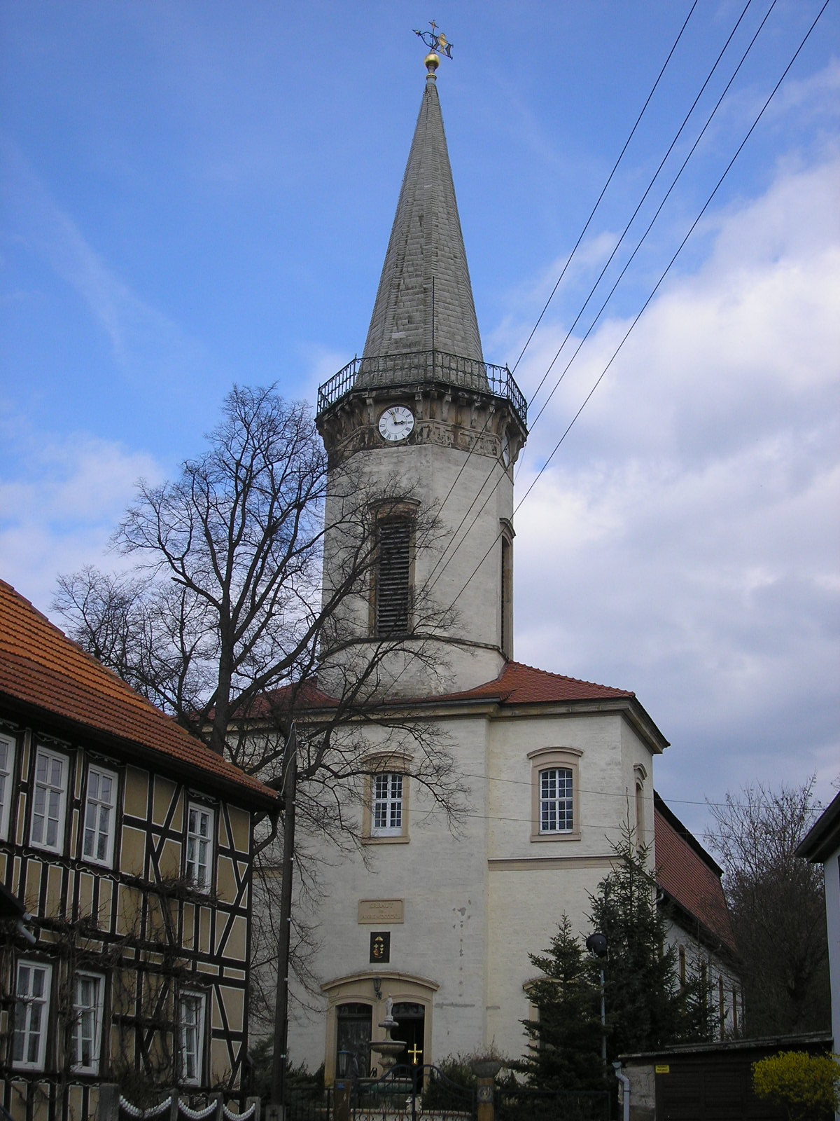 Die Dorfkirche in Werningshausen (Thüringen).